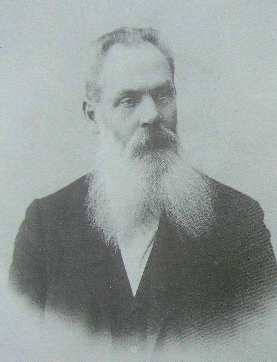 Издатель Маркс Адольф Фёдорович